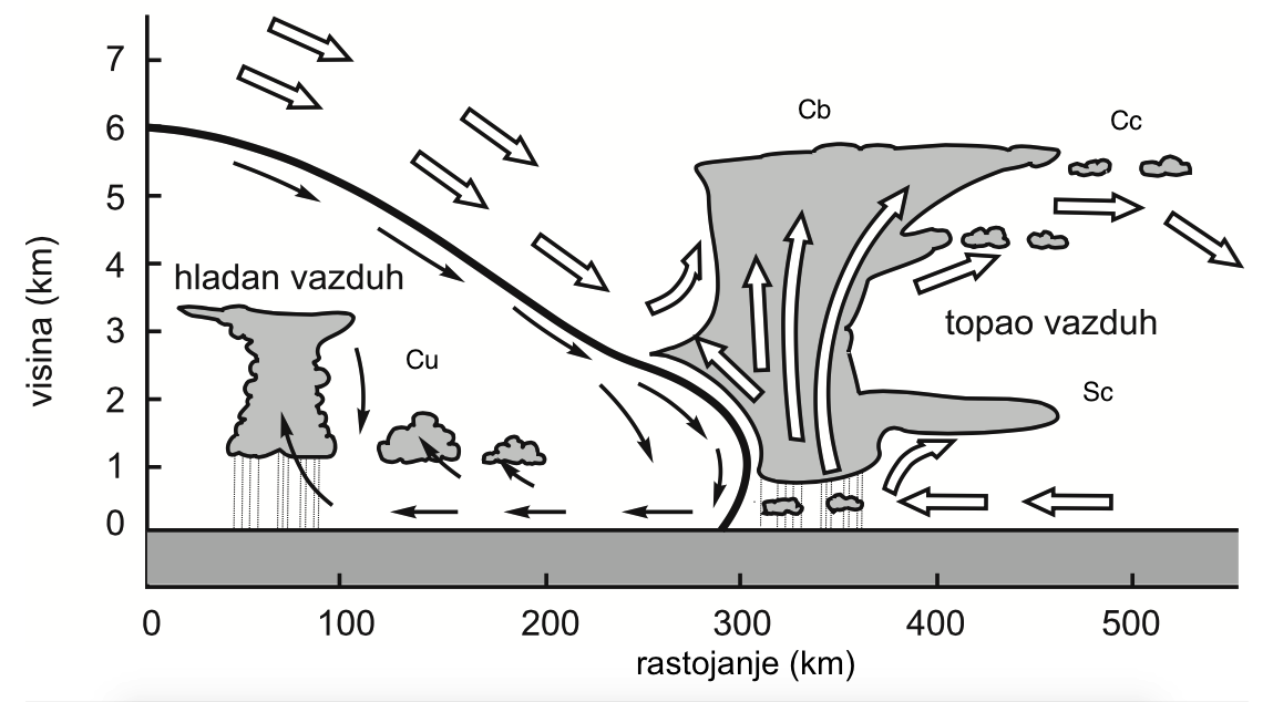 Хладни фронт другог реда